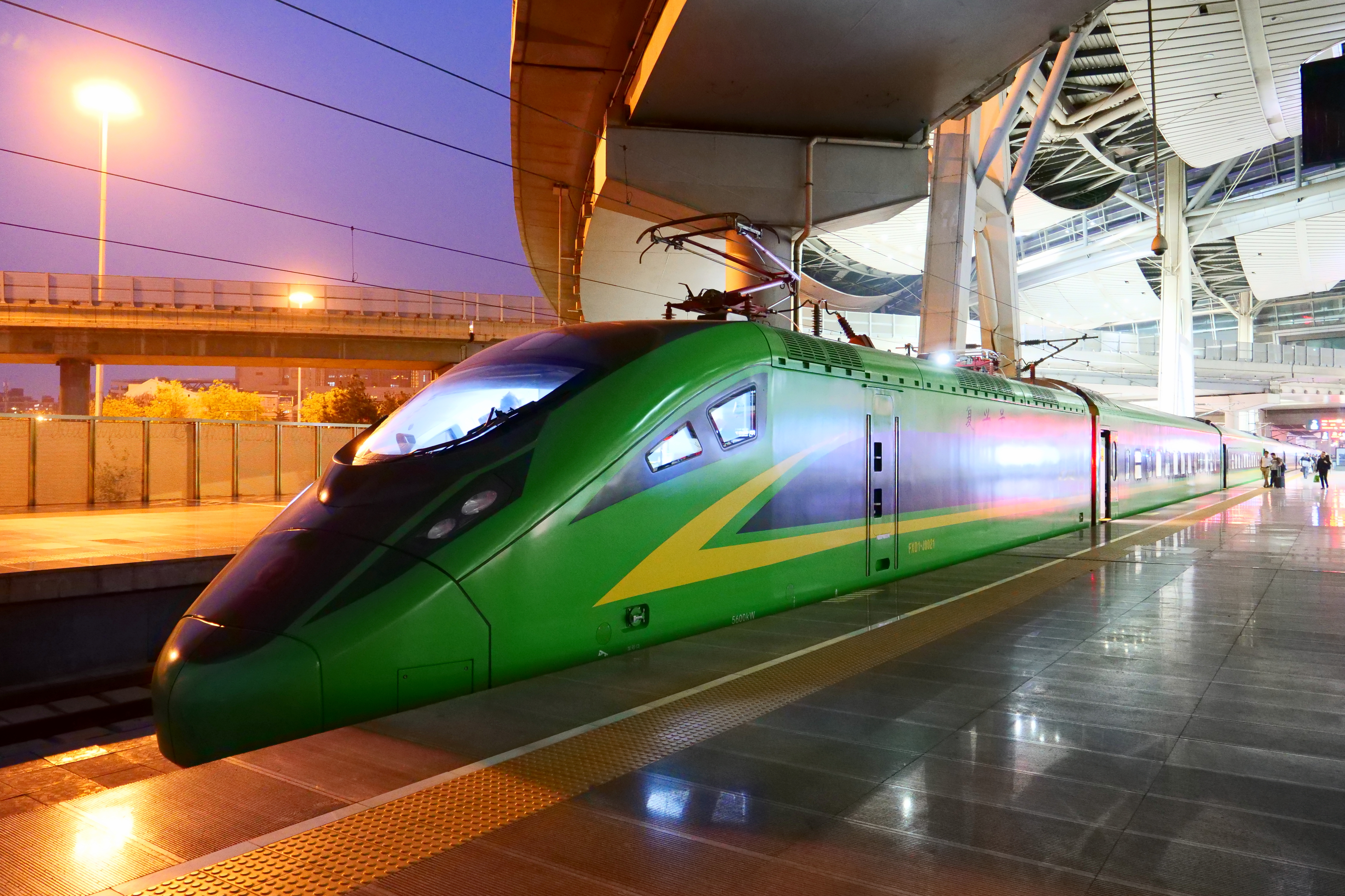 CR200J動卧在北京南站始發